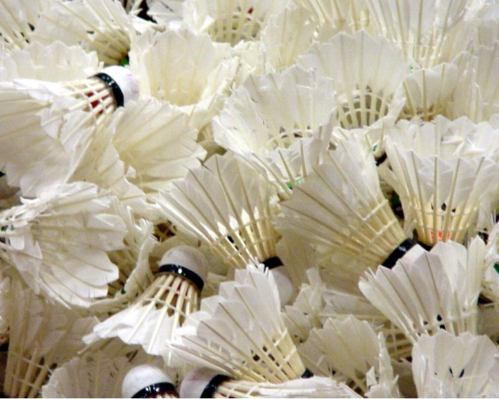 Fjerbolde til badminton